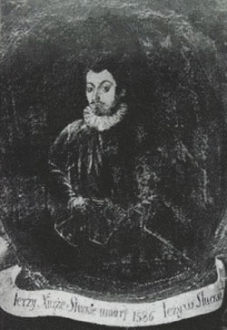 Беларуская (тарашкевіца): Партрэт Юрыя Алелькавіча (Jury Alelkavič)